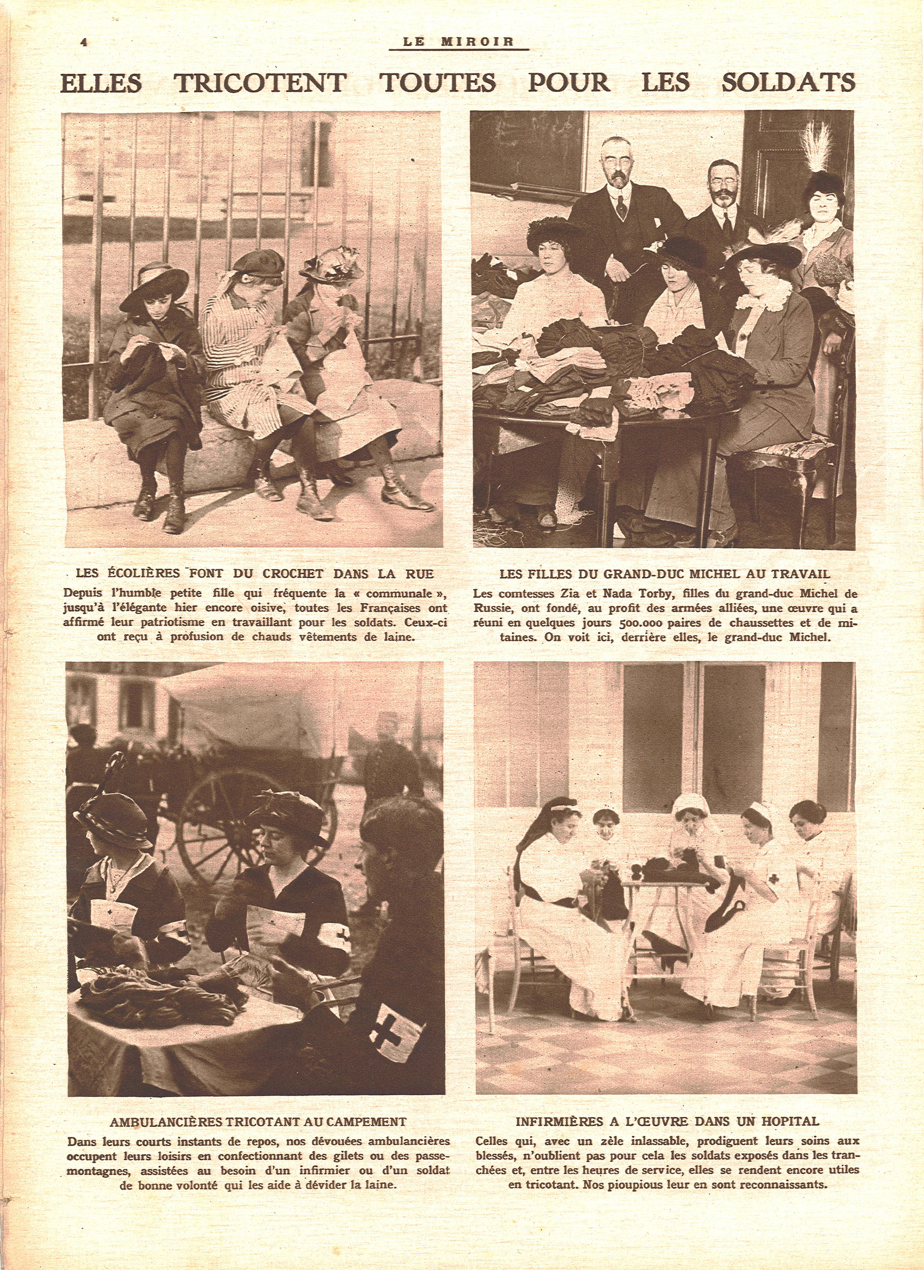 Le Miroir, n°56. Noël 1914.